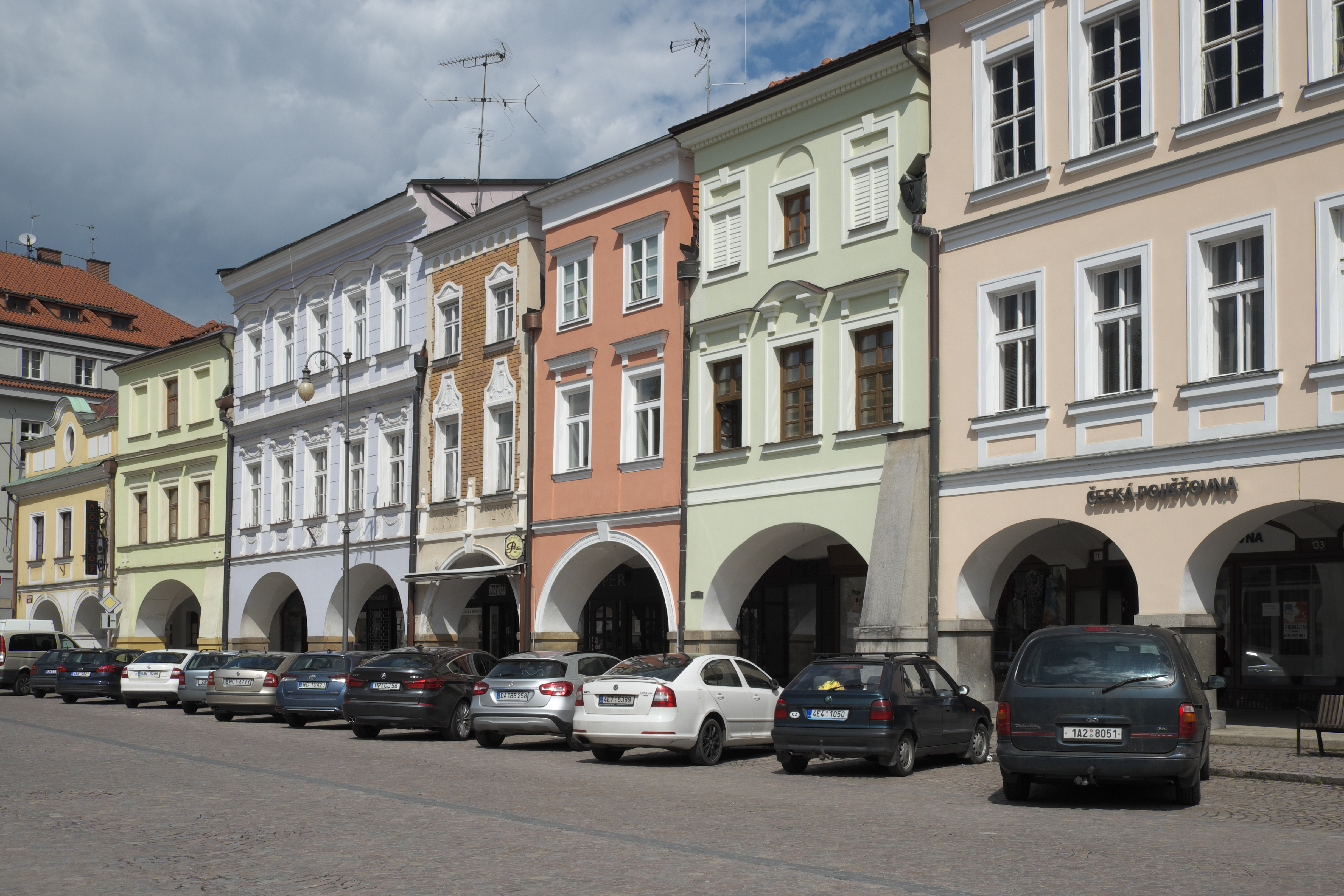 Marktplatz, Smetanovo Náměstí, in Litomyšl im Okres Svitavy in der Pardubitzer Region in Tschechien